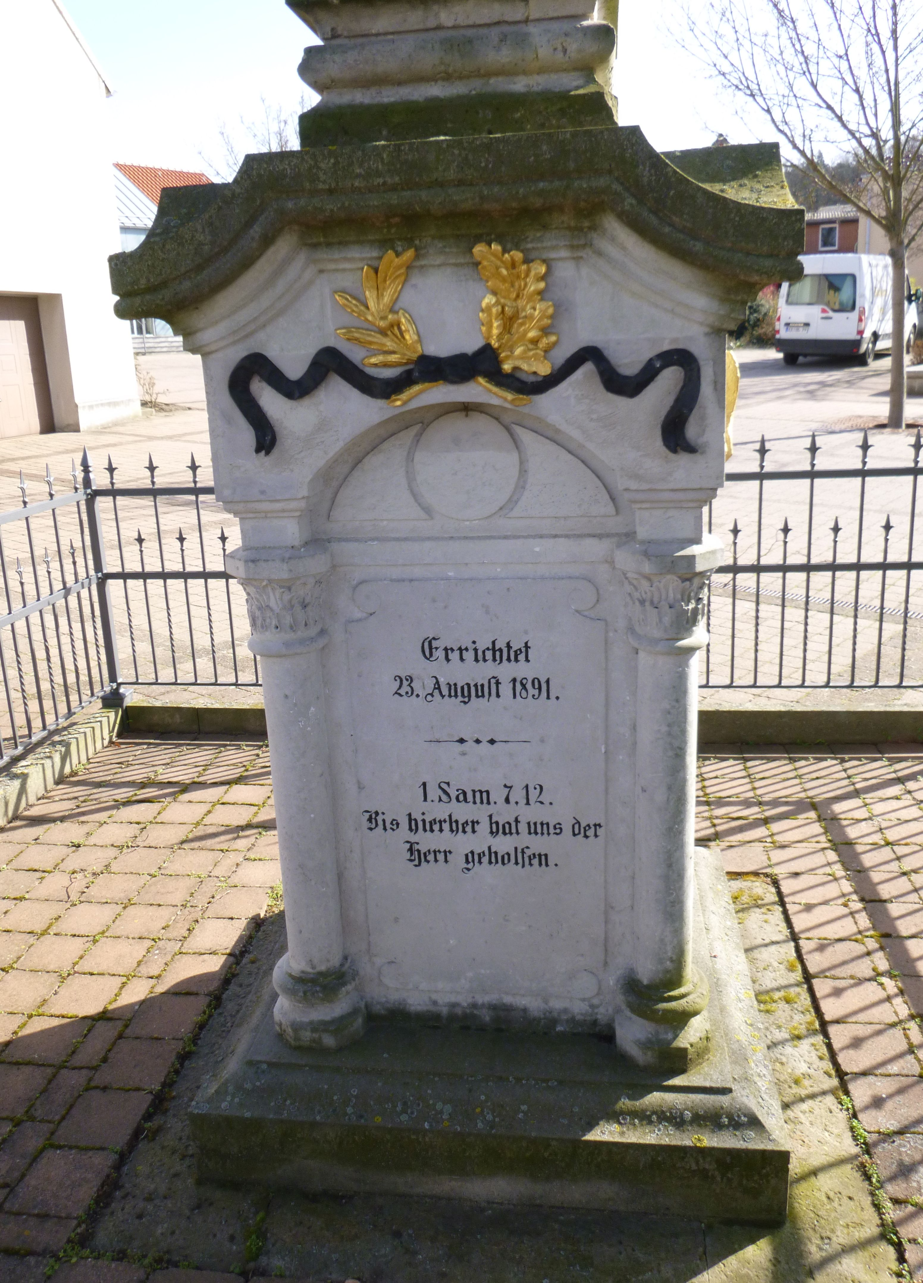 Kriegerdenkmal Gröden